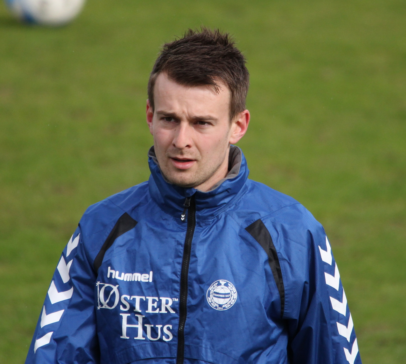 Henrik Furebotn på Sandnes Stadion i kampen mellom Sandnes ULF mot Molde